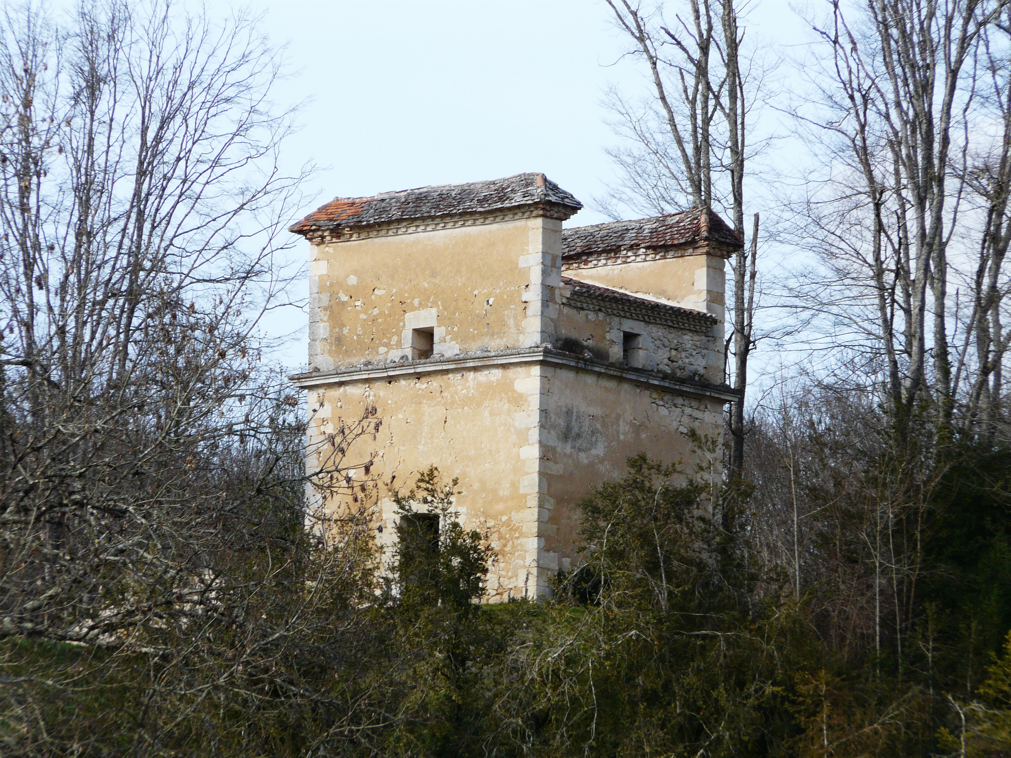 Le pigeonnier du château de Montastruc vu du sud, Lamonzie-Montastruc, Dordogne, France.